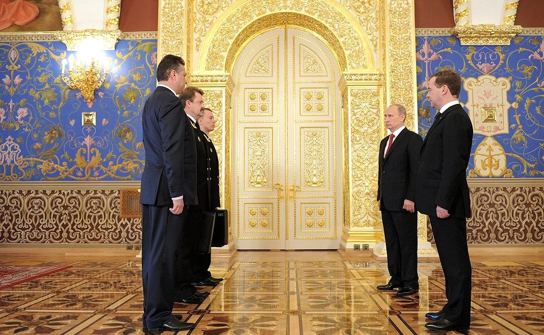 Entrega del control de las fuerzas nucleares estratégicas a Vladímir Putin.